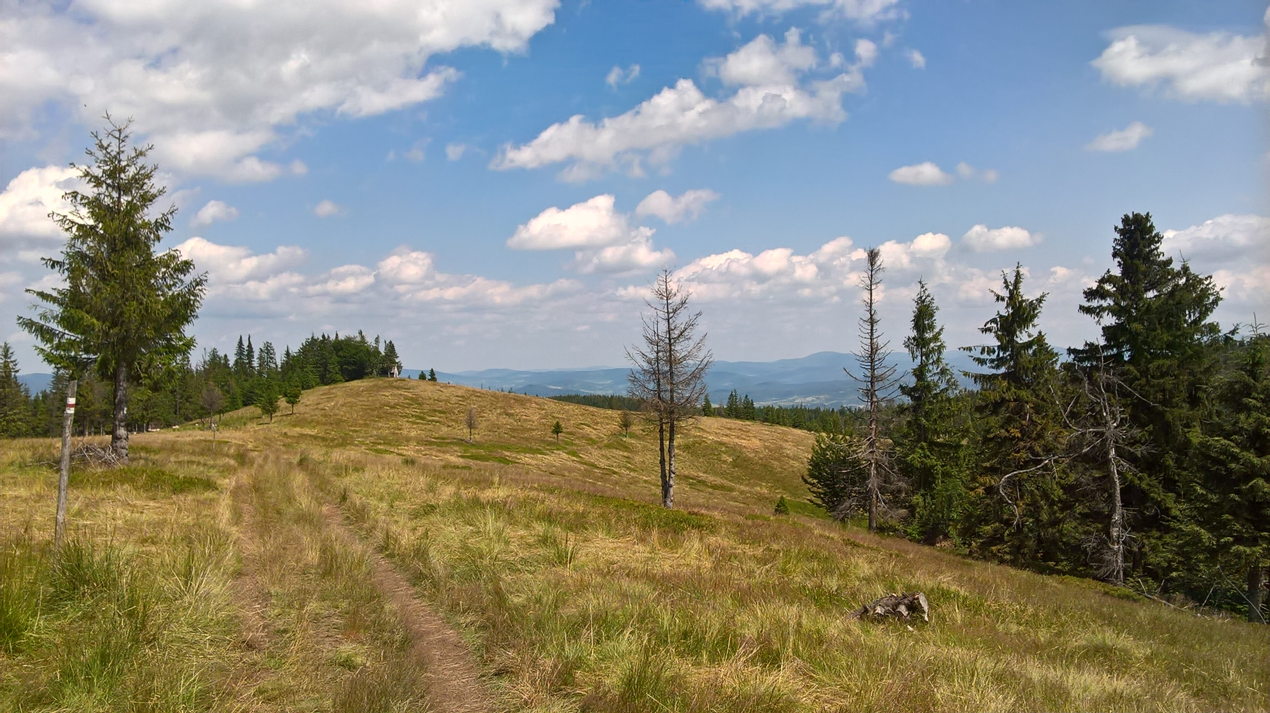 Hala Radziechowska widziana z głównego szlaku beskidzkiego